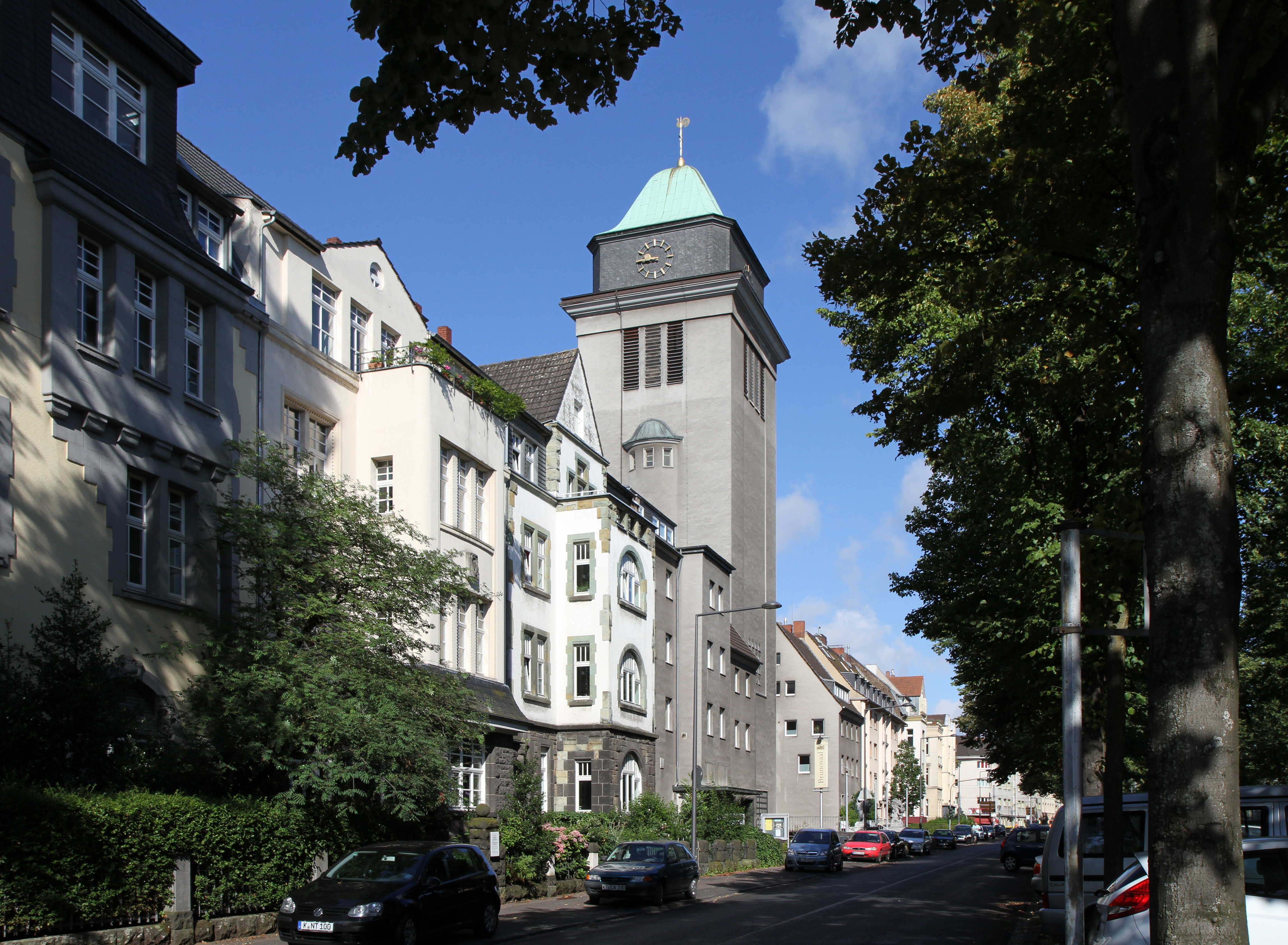 Sankt Bruno Köln-Klettenberg, Klettenberggürtel